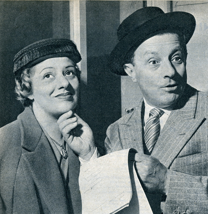 Gli attori Erika Sandri e Ermanno Roveri durante uno spettacolo RAI 1950